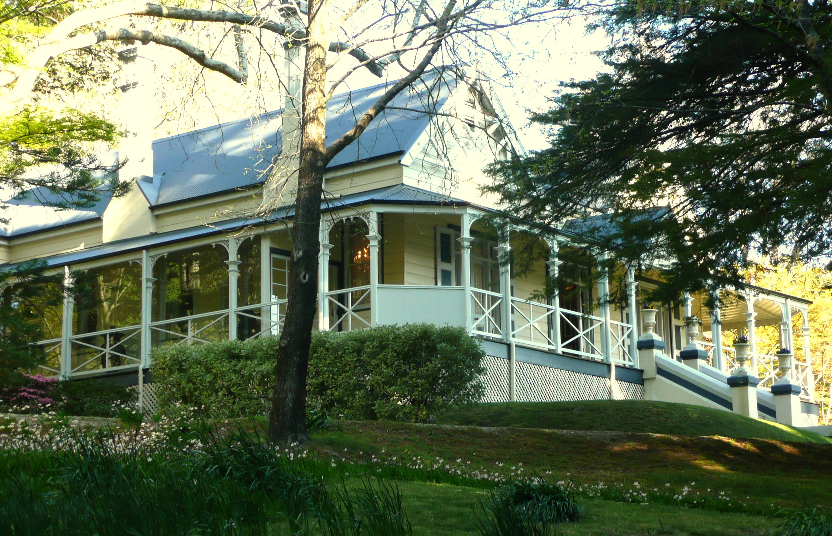 Yester Grange, NSW, Australia